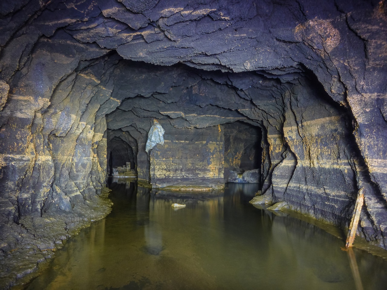 Streckenkreuz